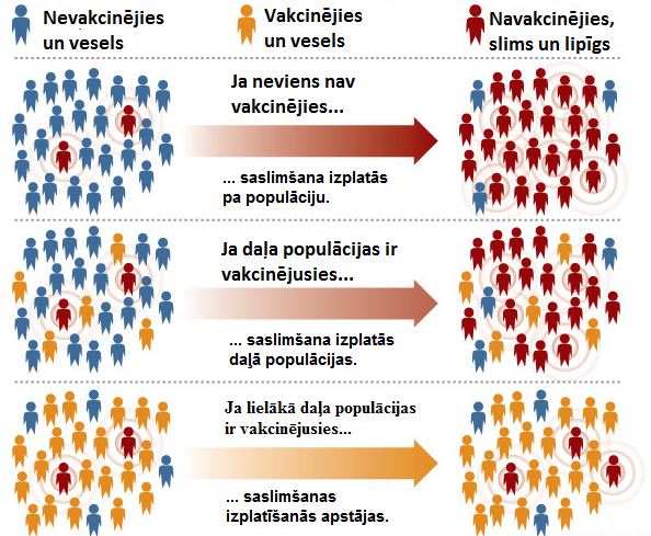 Kopiga imunitate